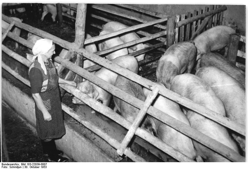 Zentralbild-Schmiljun Me-Ho. 30.10.1953 Genossenschaftsbauern wurden Millionäre. Etwas über ein Jahr ist es her, seit sich zunächst 5 Neubauern zur Landwirtschaftlichen Produktionsgenossenschaft "Florian Geyer" in Ascherleben zusammenschlossen, um 52 Hektar zu bewirtschaften. Heute zählt die Genossenschaft bereits 220 Mitglieder, der Boden ist auf 940 ha angewachsen. Ende April 1953 ging die Genossenschaft zum Typ III über und besitzt jetzt 312 Rinder, 844 Schweine, 154 Mutterschafe, 750 Hennen, 71 Arbeitspferde. Schon heute stellt die LPG "Florian Geyer" ein Millionenunternehmen dar. Die Genossenschaft verdankt ihre grossen Erfolge hauptsächlich ihrem Leitungskollektiv, das in diesem Jahre mit dem Nationalspreis ausgezeichnet wurde. UBz, 844 Schweine, darunter 75 Sauen, besitzt die Genossenschaft. -(links) Schweinezuchtgehilfin Urban.